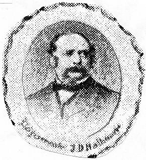 Josef Dionys Halbmayr (1813 - 1879), Rakouský a český politik.